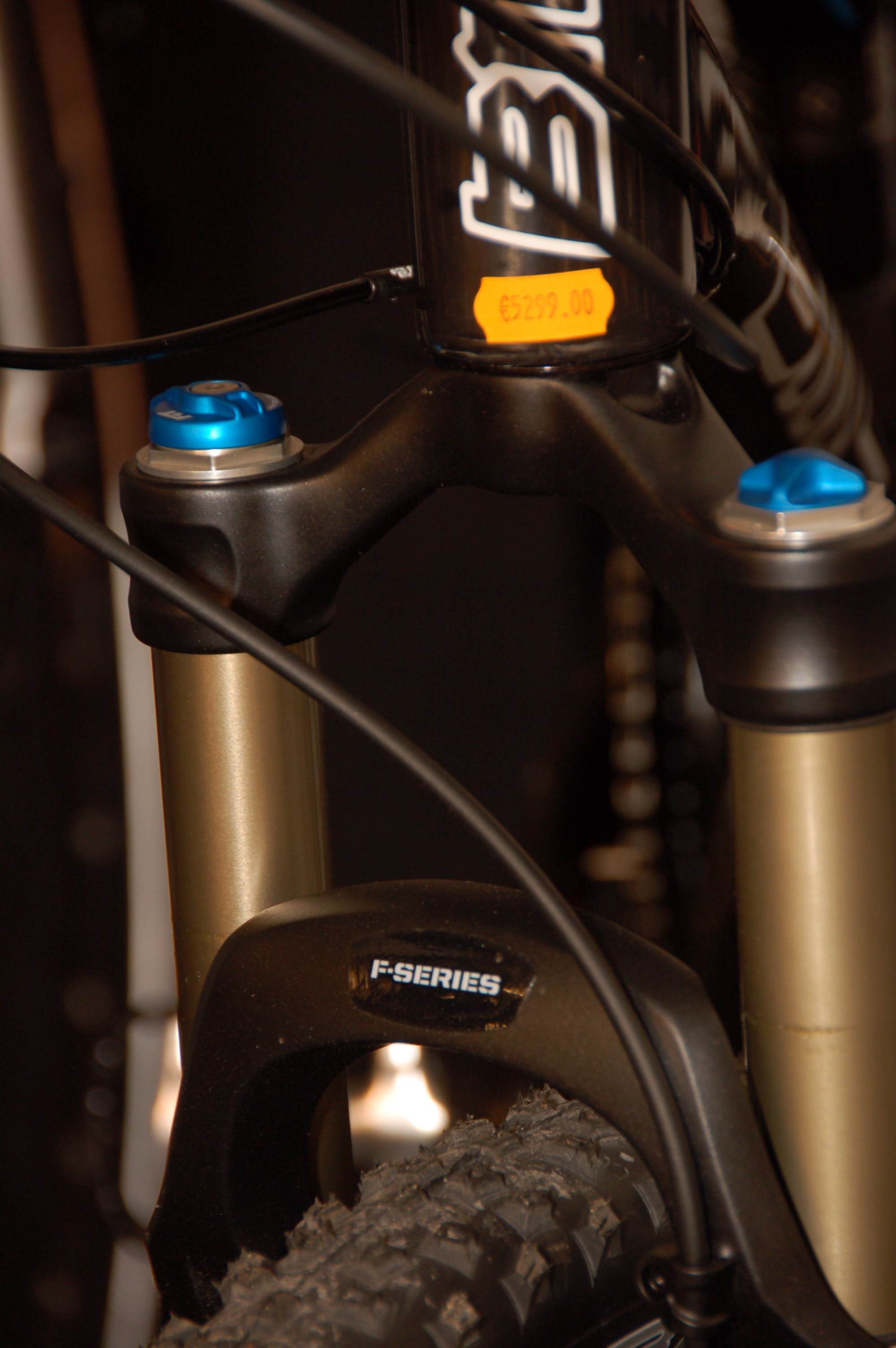 Detail Fahrradtechnik; mit freundlicher Genehmigung von - fahrradvermietung am Kurfürstendamm